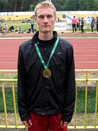 lekkoatleta